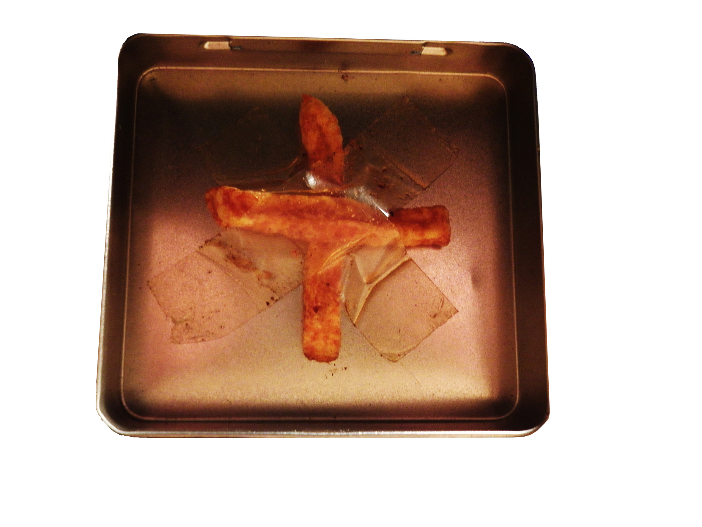 22 year old french fries cross (foto from 2012)